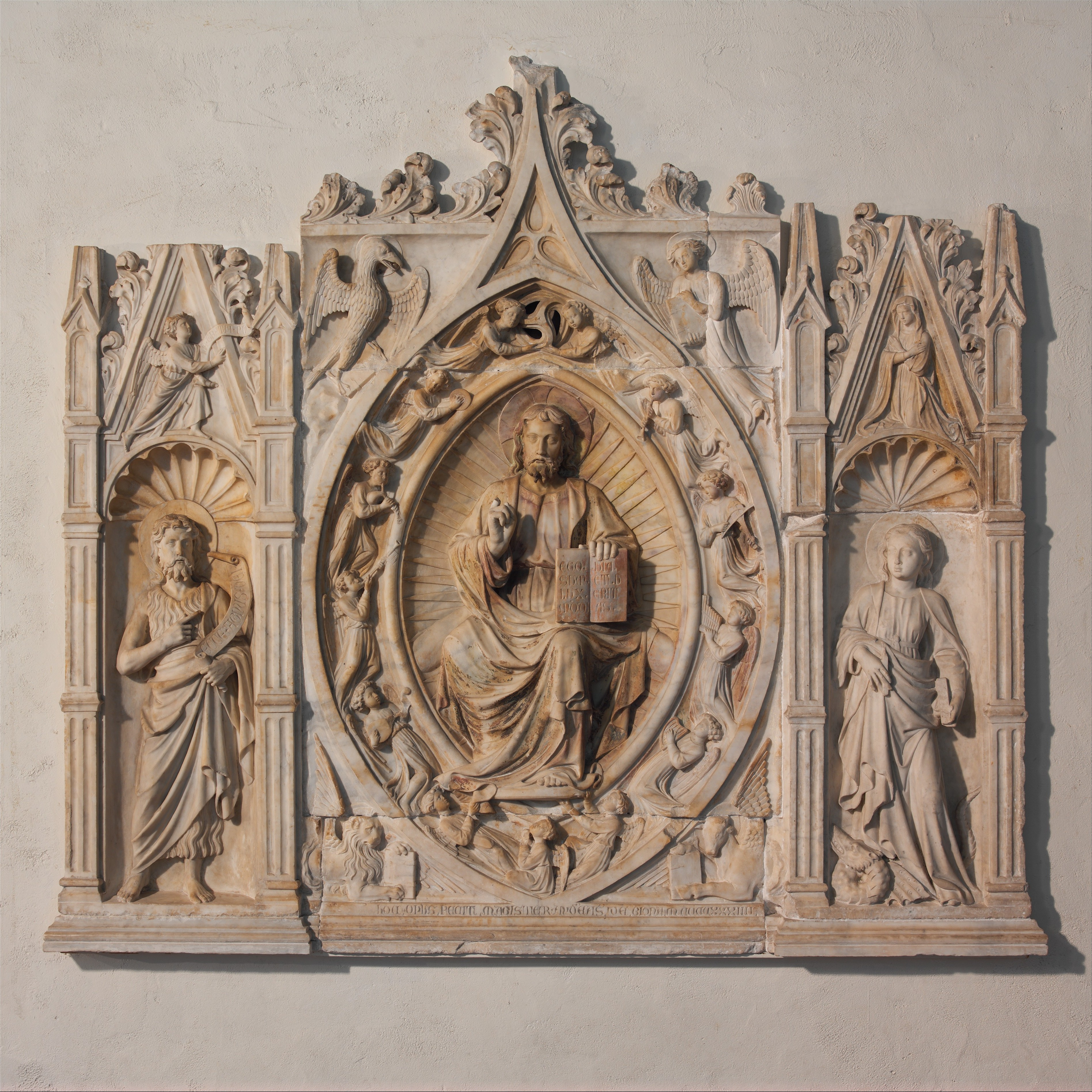 Italian; Altarpiece; Sculpture